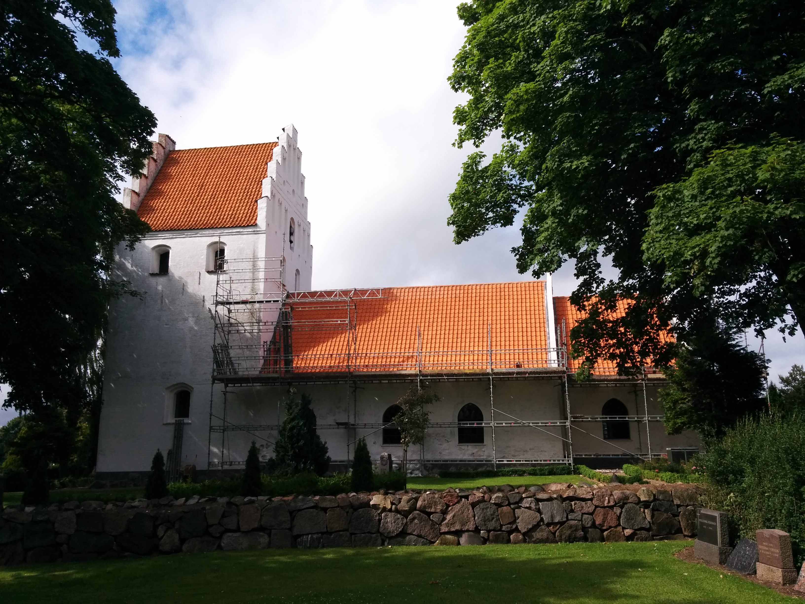 Bovense Kirke fra syd